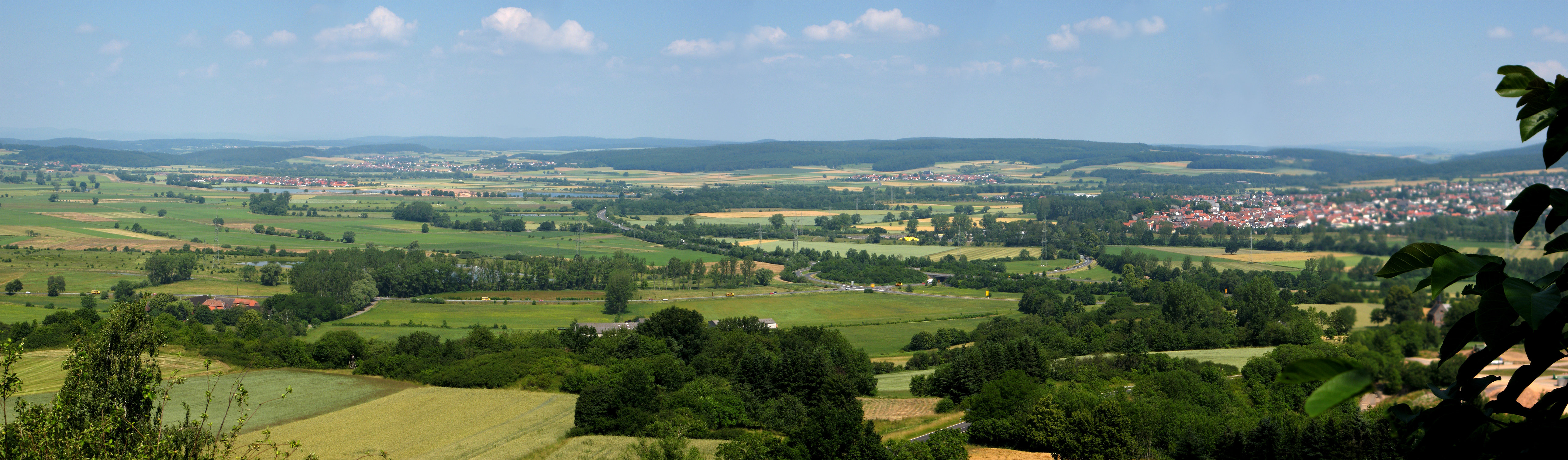 Ohmbecken bei Kirchhain. Man sieht von links nach rechts die Ortsteile Schönbach, Niederwald, Anzefahr, Stausebach und Kirchhain